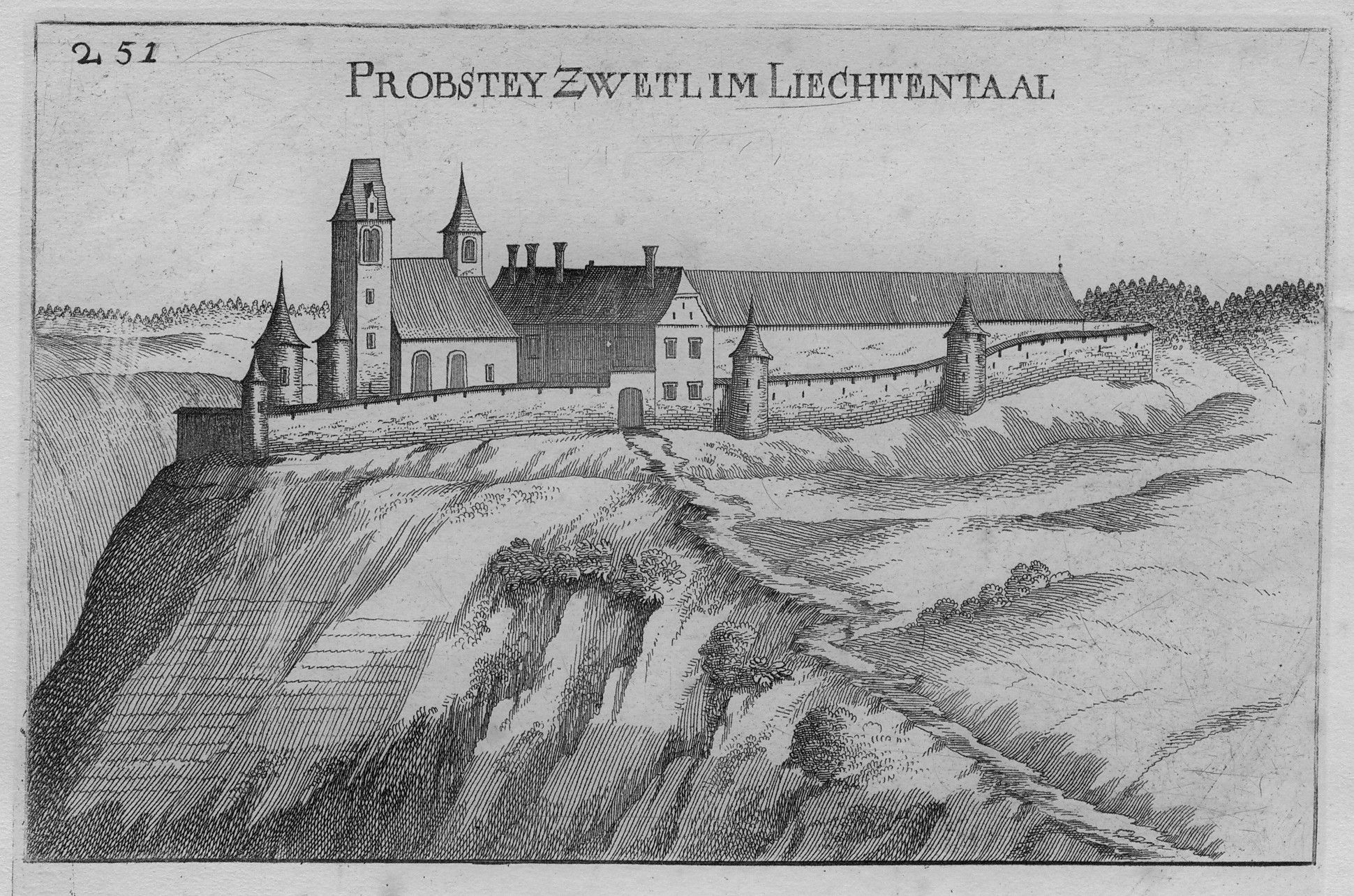 Kupferstich der Propstei Zwettl von Georg Matthäus Fischer (1672)